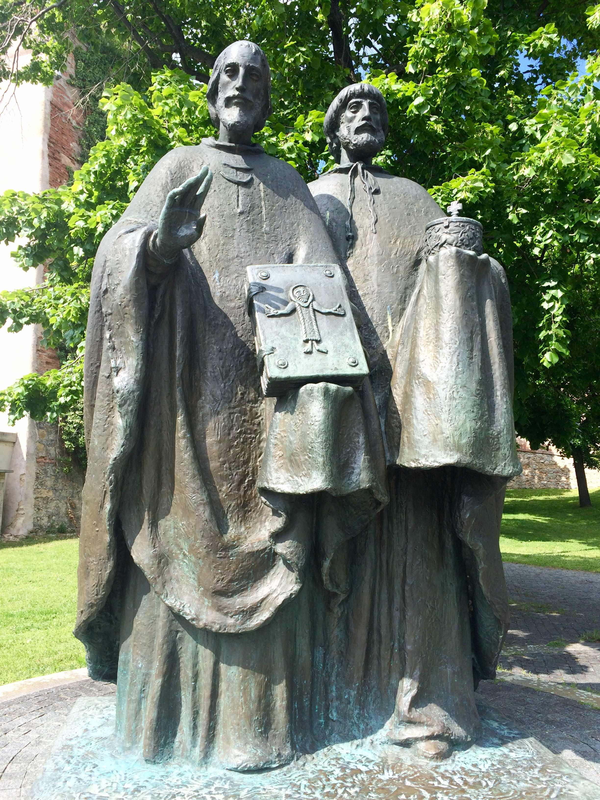 Памятник Кириллу и Мефодию. Нитра. Словацкая республика